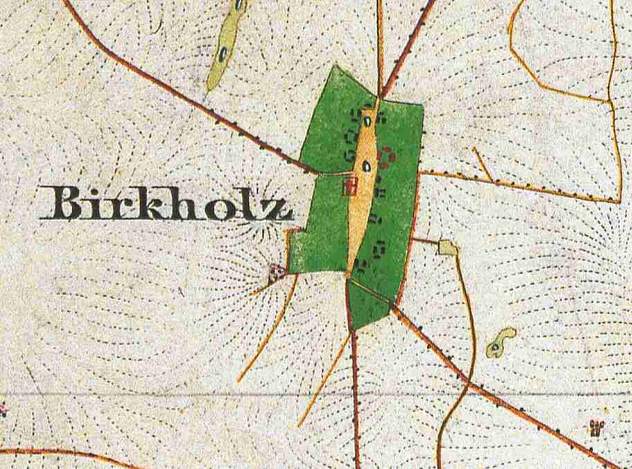 Birkholz, Ortsteil der Gemeinde Rietz-Neuendorf, Lkr. Oder-Spree, Brandenburg, Deutschland, Ausschnitt aus dem Urmesstischblatt 3851 Beeskowvon 1846